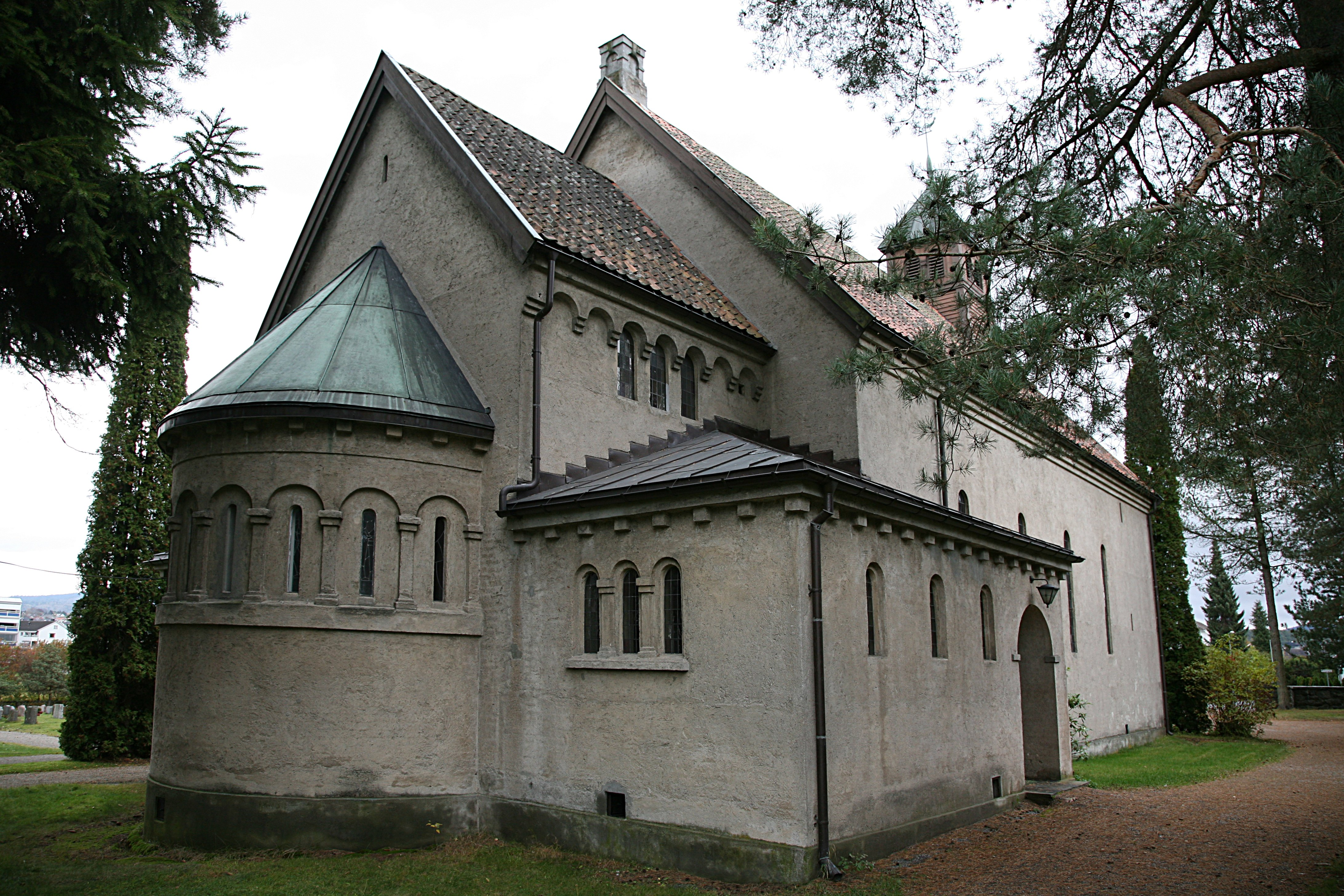 Gimsøy kirke. A church in Skien, Telemark, Norway.